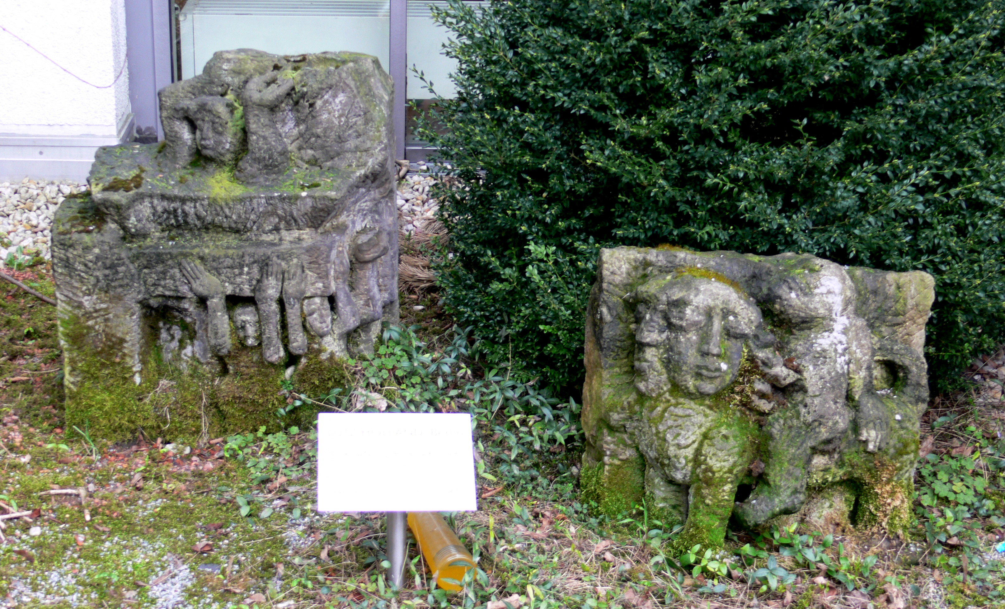 Skulpturengarten der Volksbank Chemnitz in der Inneren Klosterstraße; Dauerleihgaben der Neuen Sächsischen Galerie Chemnitz. Lutz Holland: Für Janusz Korczak, zweiteilige Sandsteinskulptur, um 1976